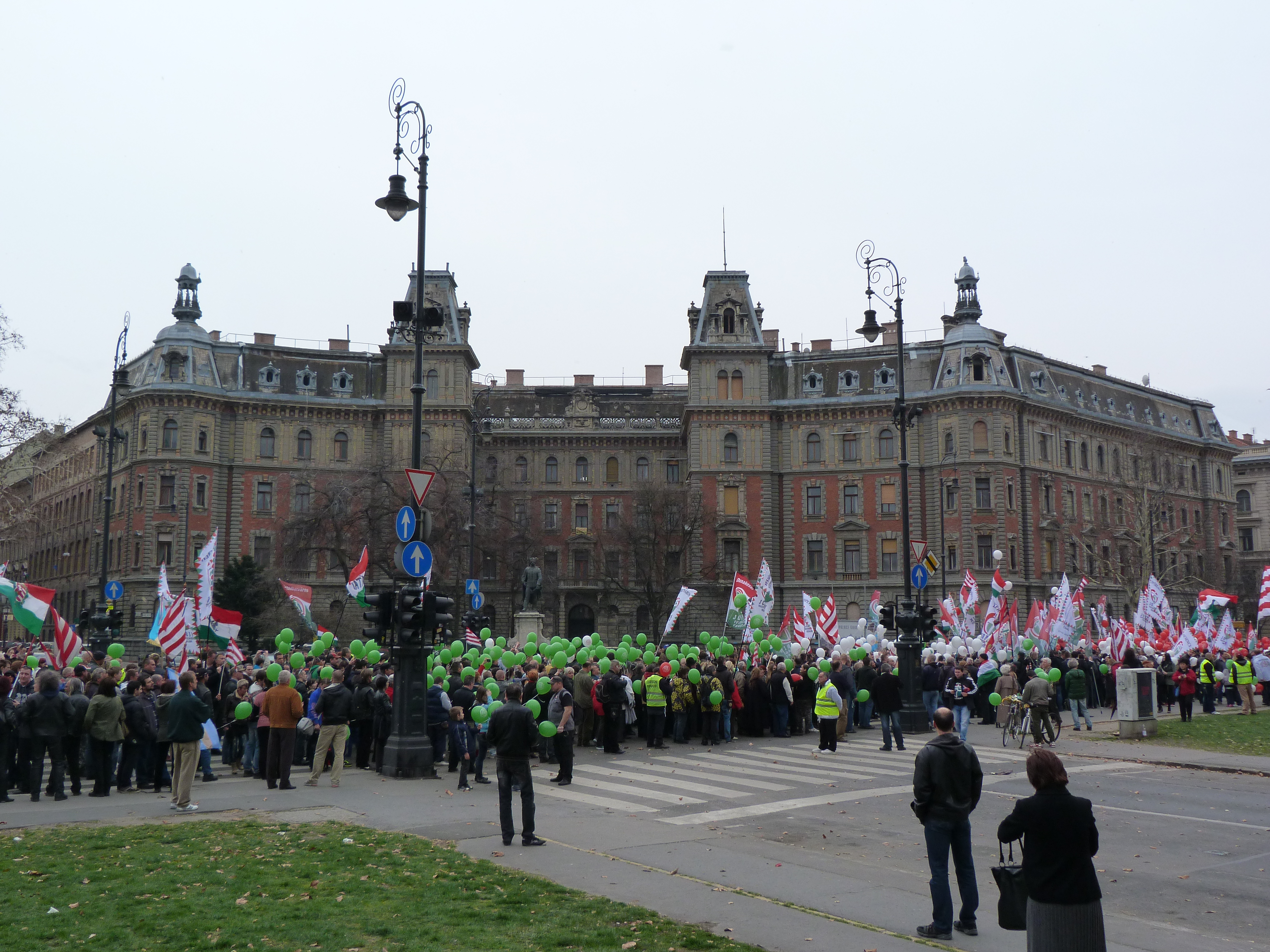 A felvétel 2014. március 15 -én készült Budapesten, a Köröndön. A Jobbik naggyűlése. A nagygyűlés követően annak résztvevői az Andrássy úton mentek a Jobbik Deák téri naggyűlésére. © Derzsi Elekes Andor, Budapest, 2014, A fénykép egészben, vagy részletekben másolását, bármilyen úton történő sokszorosítását és felhasználását a szerző ellenérték nélkül, jogutódjaira is kihatóan megengedi. Az engedély kiterjed a kereskedelmi célú hasznosításra is. Kéri azonban nevének feltüntetését a felhasználás során. A Metapolisz sorozat valamennyi képe és filmje Creative Commons alatti valamint kereskedelmi - for profit - célra is felhasználható.